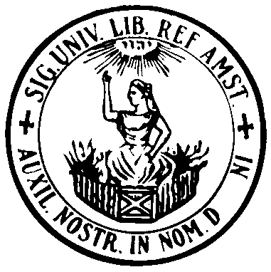 Zegel van de Vrije Universiteit Amsterdam